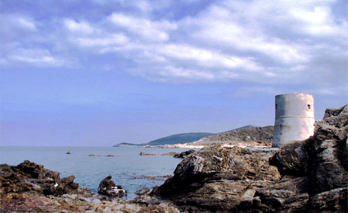 Ersa (Corsica) - Tour génoise de Tollare